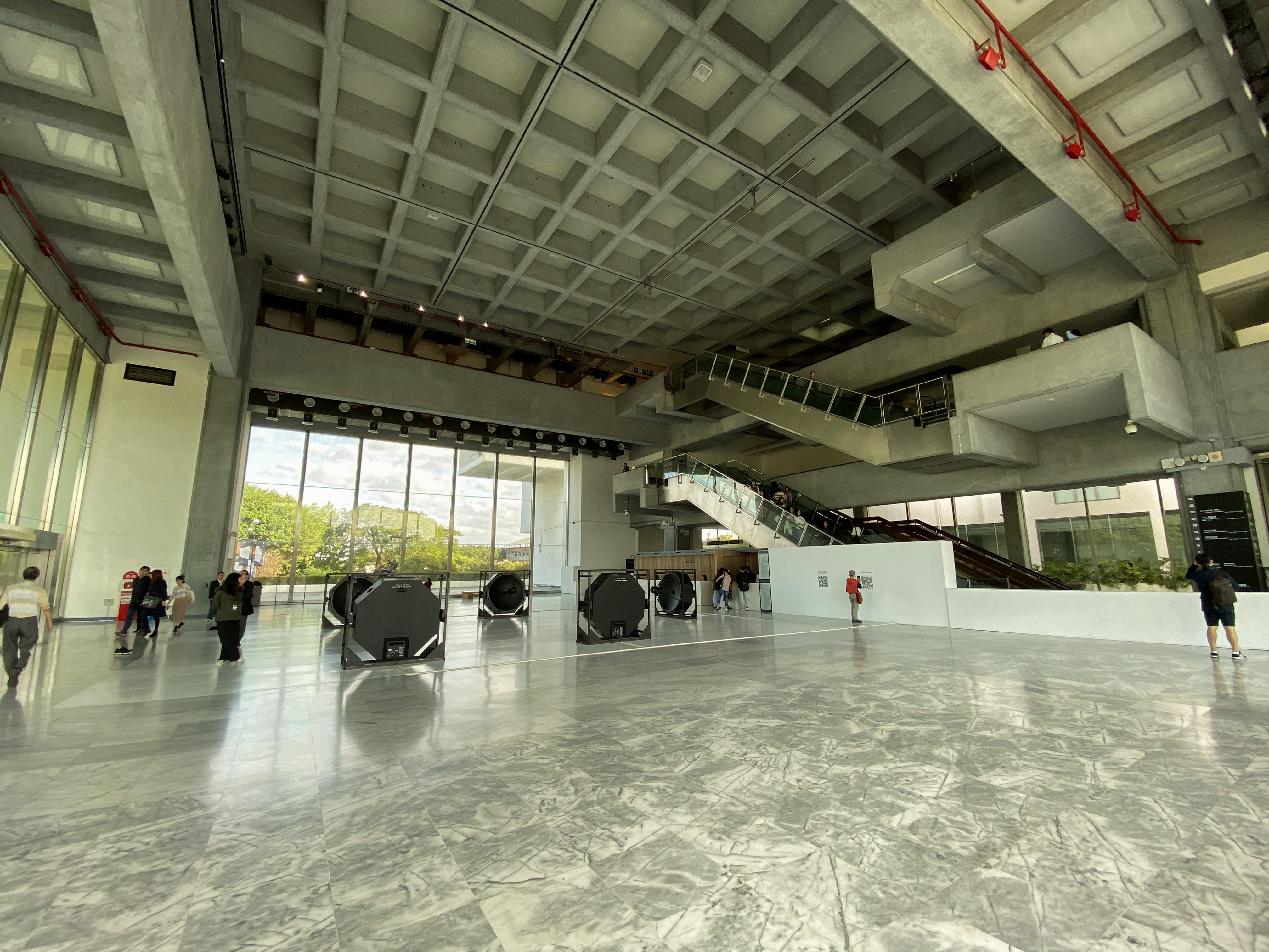 Taipei Fine Arts Museum